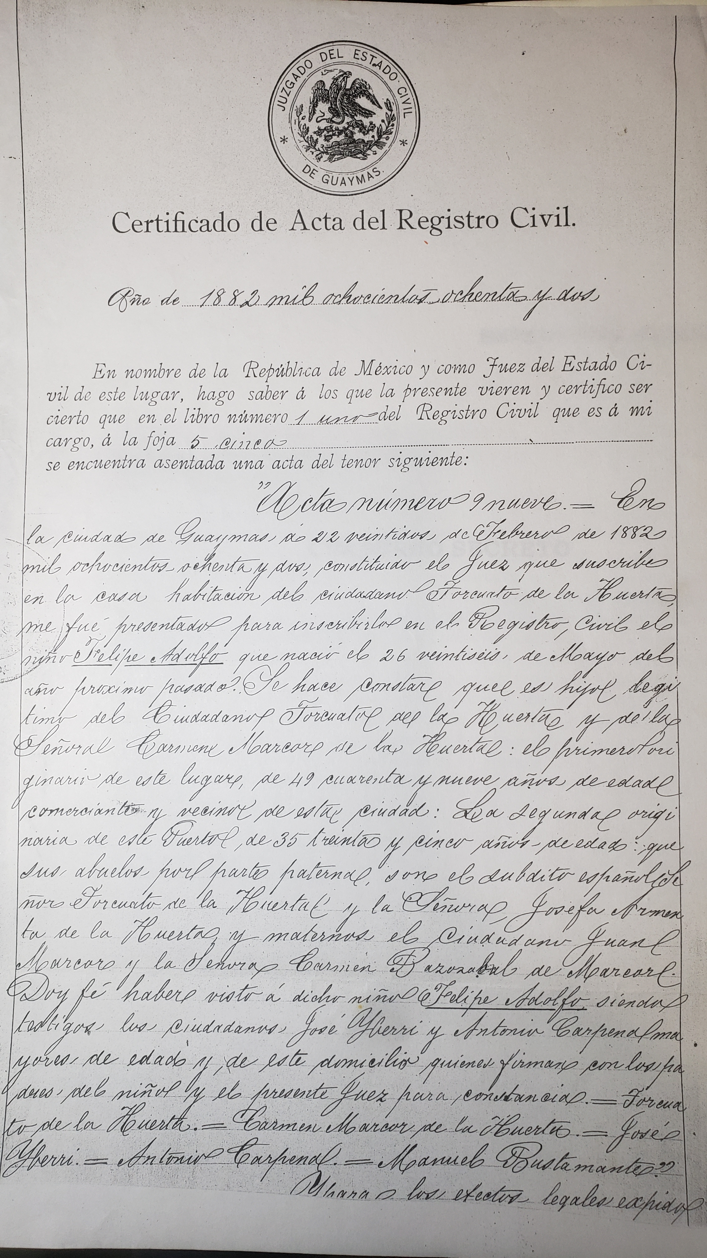 Copia del acta de nacimiento de Adolfo de la Huerta